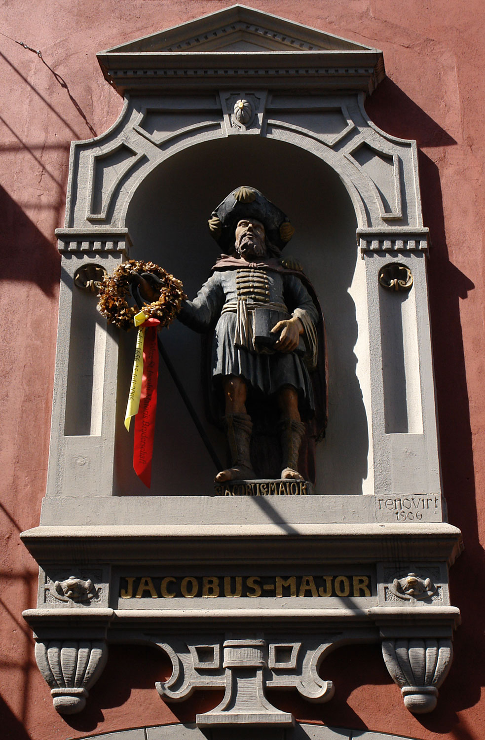 Bremen: Jacobus-Major im Schnoor. Herstellung um 1660, renoviert 1906Das abgebildete Objekt ist ein geschütztes Kulturdenkmal in der Freien Hansestadt Bremen, mit der Nr. 1341,T001 beim Landesamt für Denkmalpflege registriert.